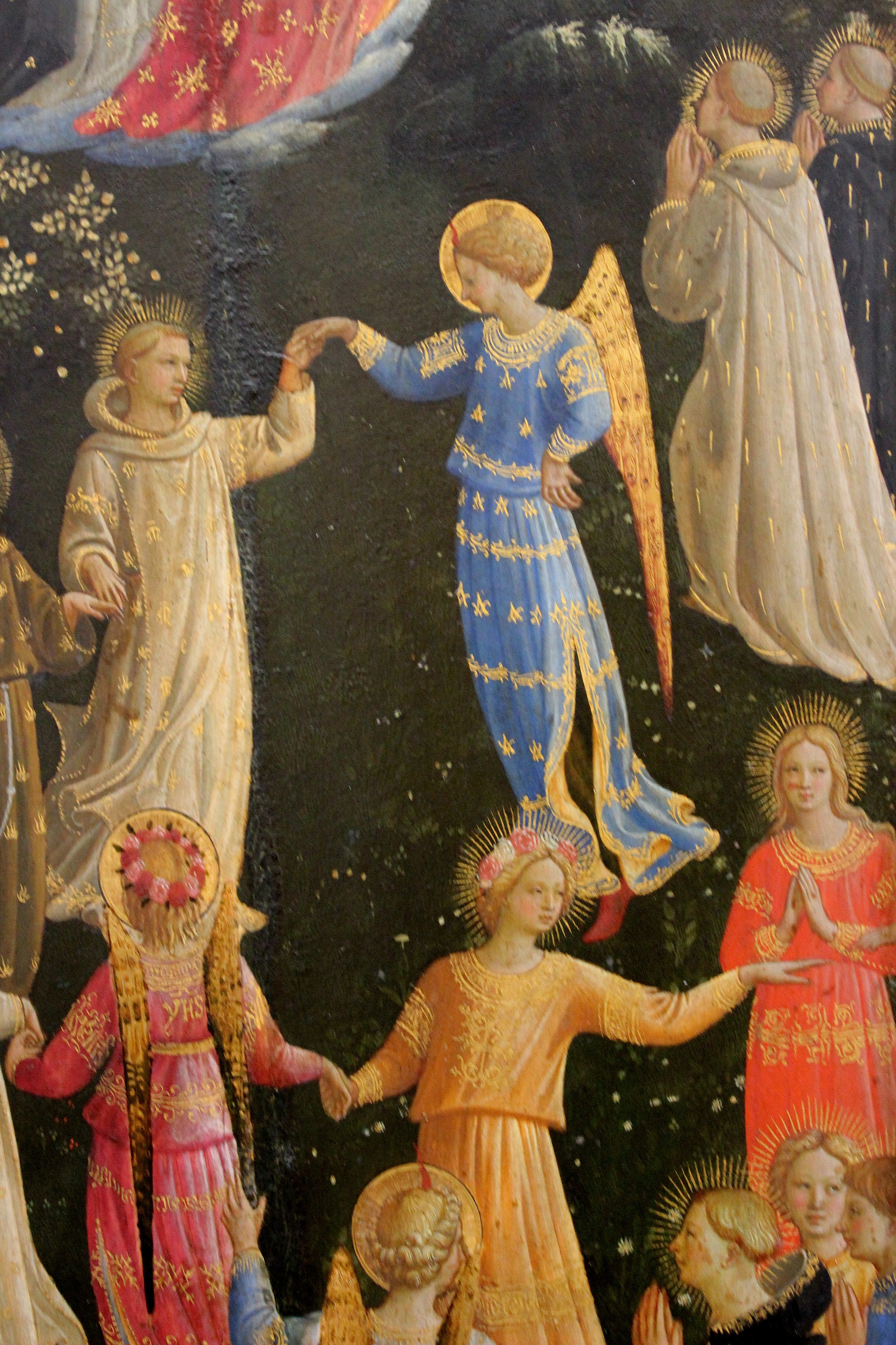 Berlín, Gemäldegalerie. Juicio Final por Fra Angelico.